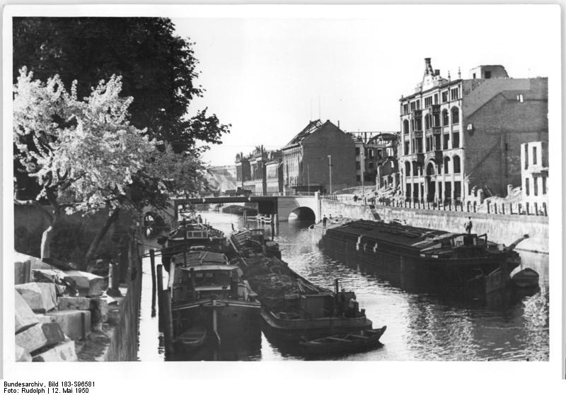 Illus Rudolph, Berlin im Mai 1950 UBz: Blick auf die Liebknechtbrücke. 12.5.50. 6498-50